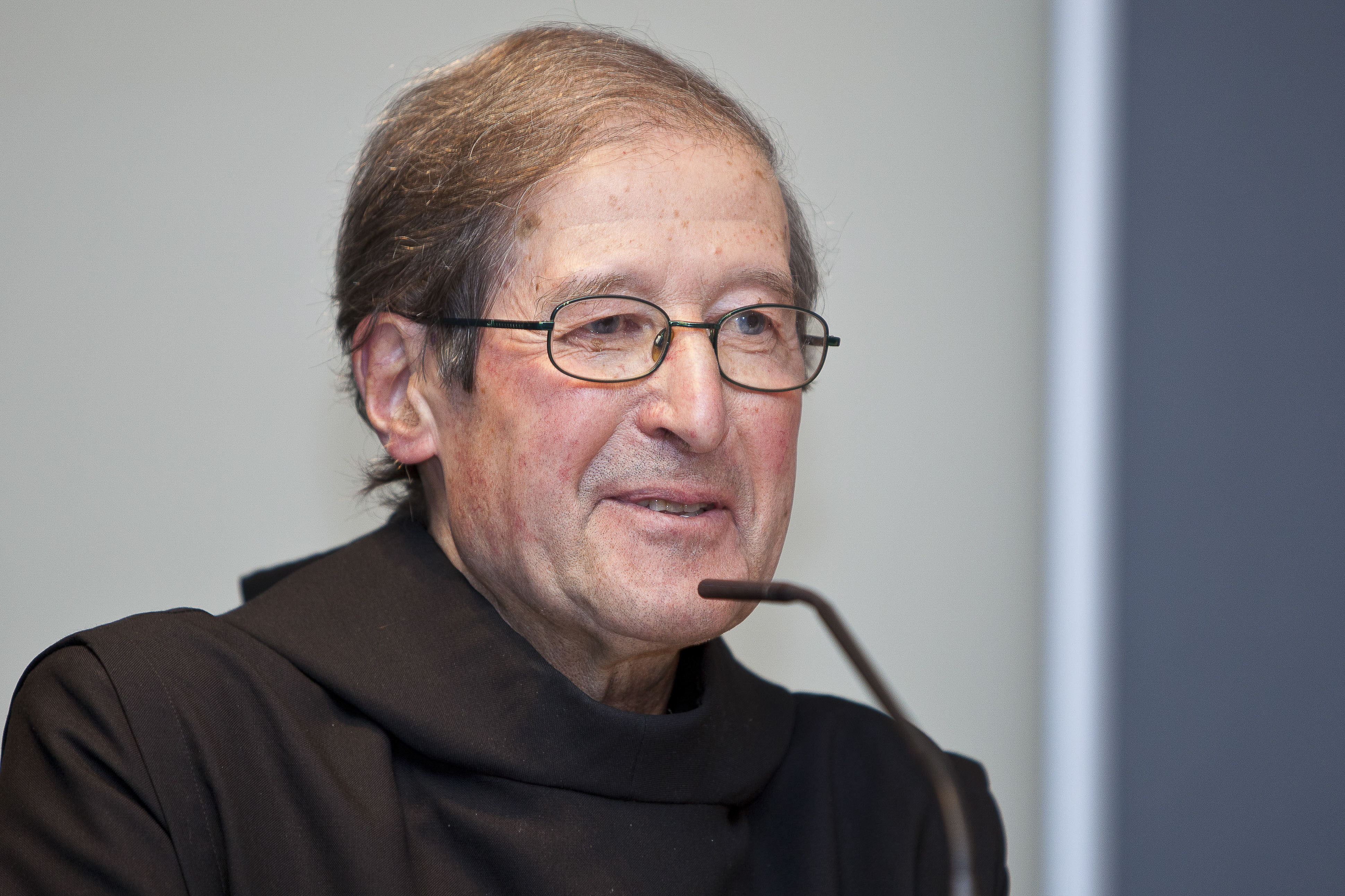 Pater Dr. Severin Schneider OSB, Benediktinermönch der Abtei Seckau